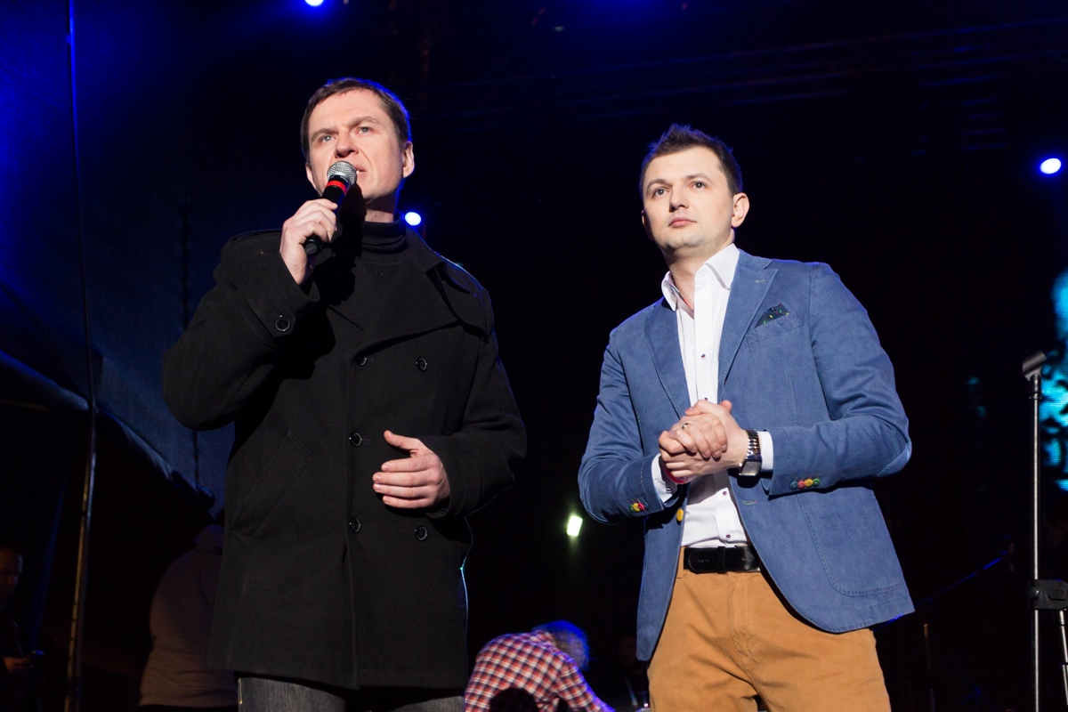 Koncert "Solidarni z Białorusią" 12 kwietnia 2014 roku na ul. gen. Tokarzewskiego-Karaszewicza w Warszawie.